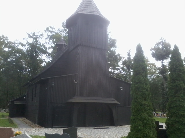 Kościół parafialny pw. św.Marii Magdaleny w Starym Oleśnie